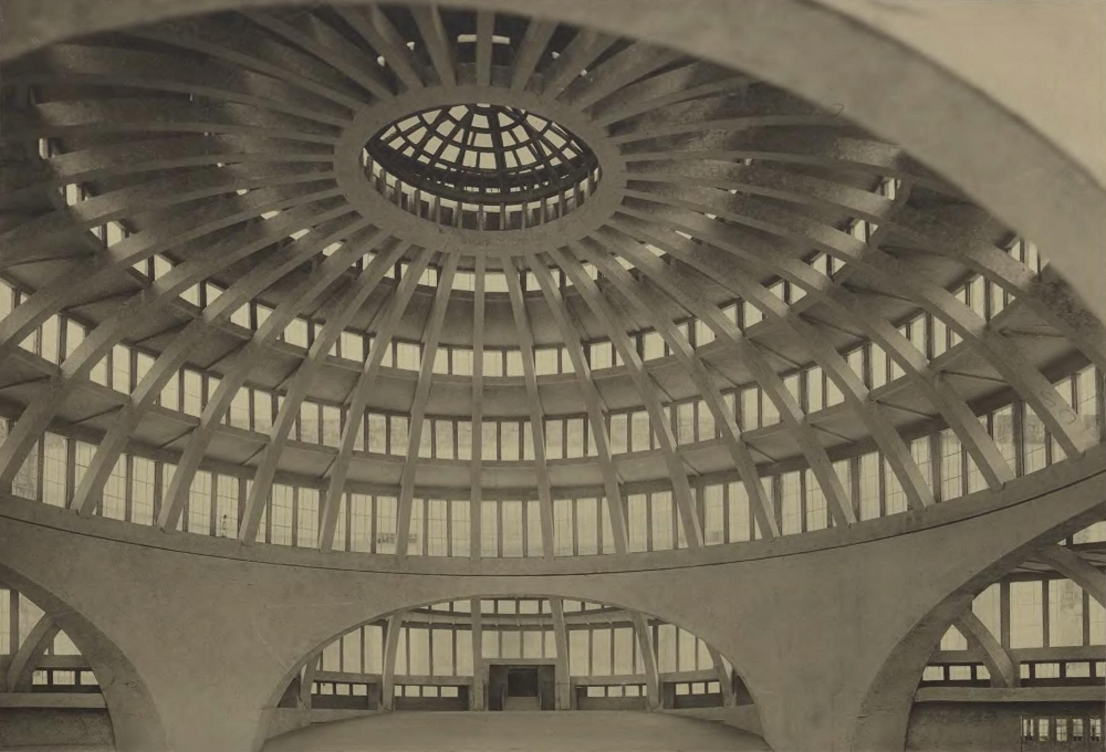 Die Jahrhunderthalle in Breslau von innen